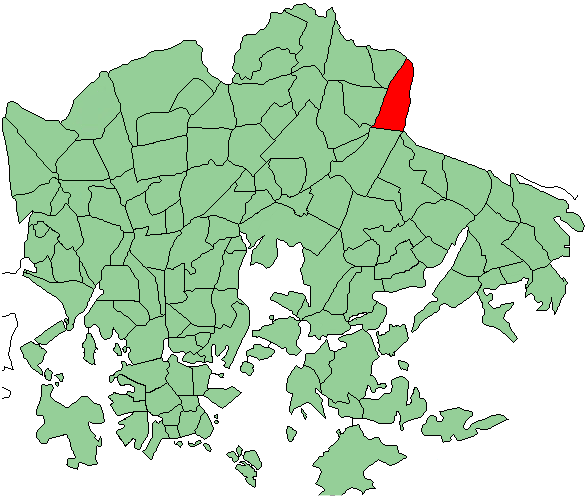 Districts of Helsinki, Jakomäki district highlighted (in Finnish: Jakomäen peruspiiri korostettuna)